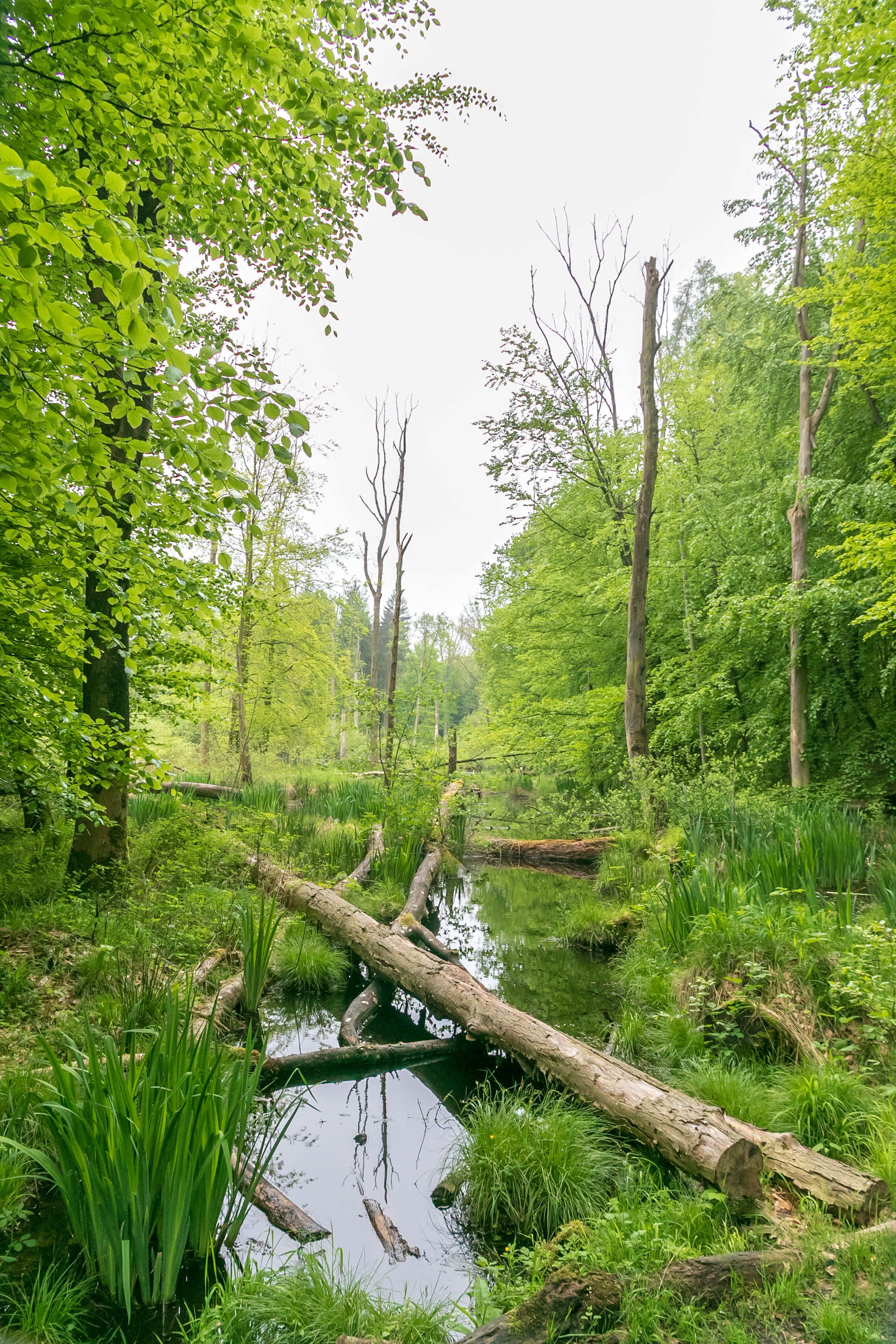 Naturwald Stodthagen und angrenzende Hochmoore am Kaltenhofer Moor